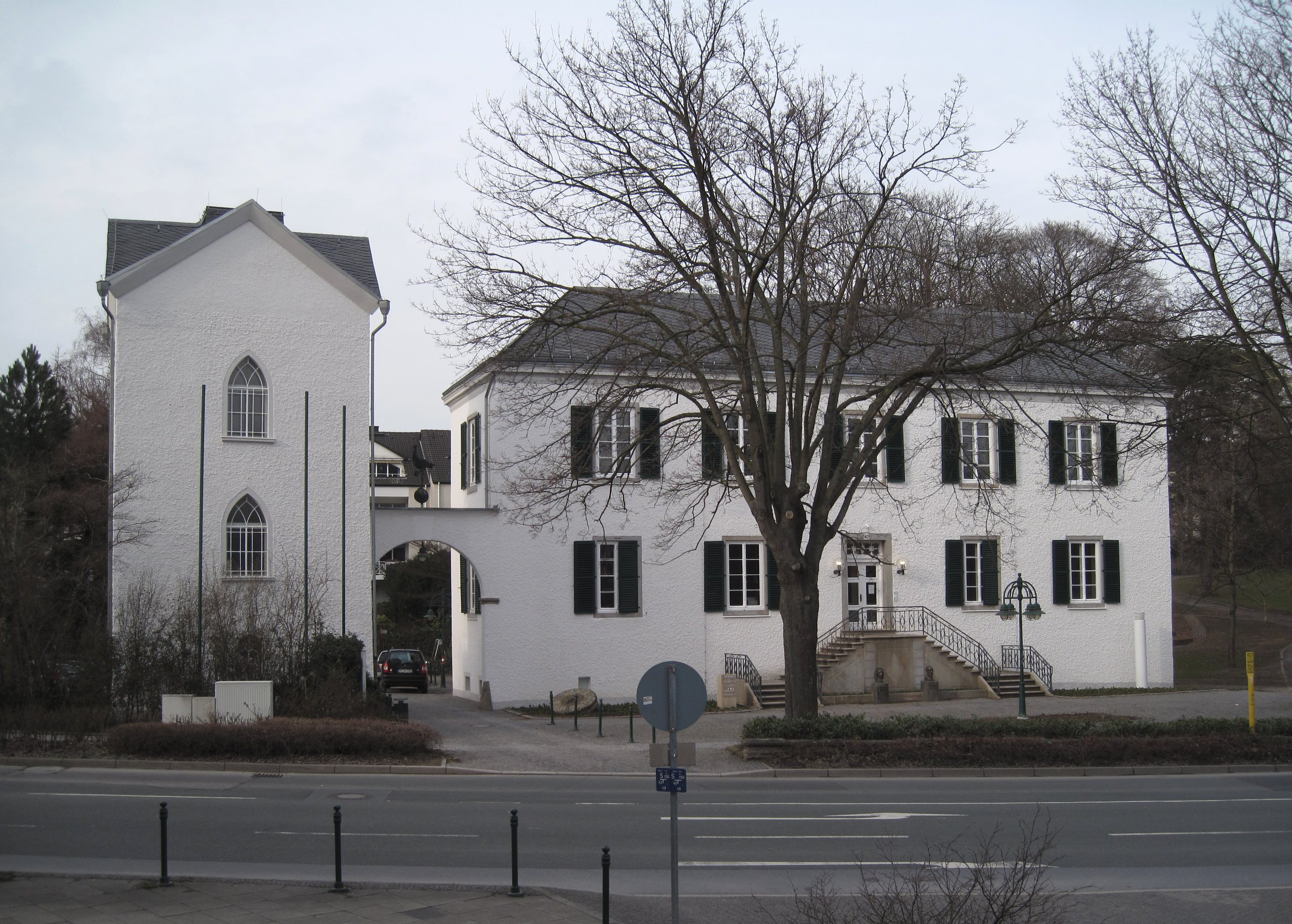 Haus Letmathe in Iserlohn-Letmathe, Hagener Straße 62-64. Baudenkmal seit 23. Juni 1983